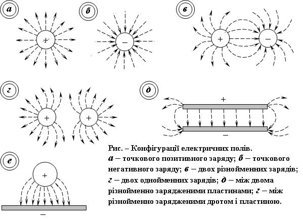 Схема конфігурації електричних полів